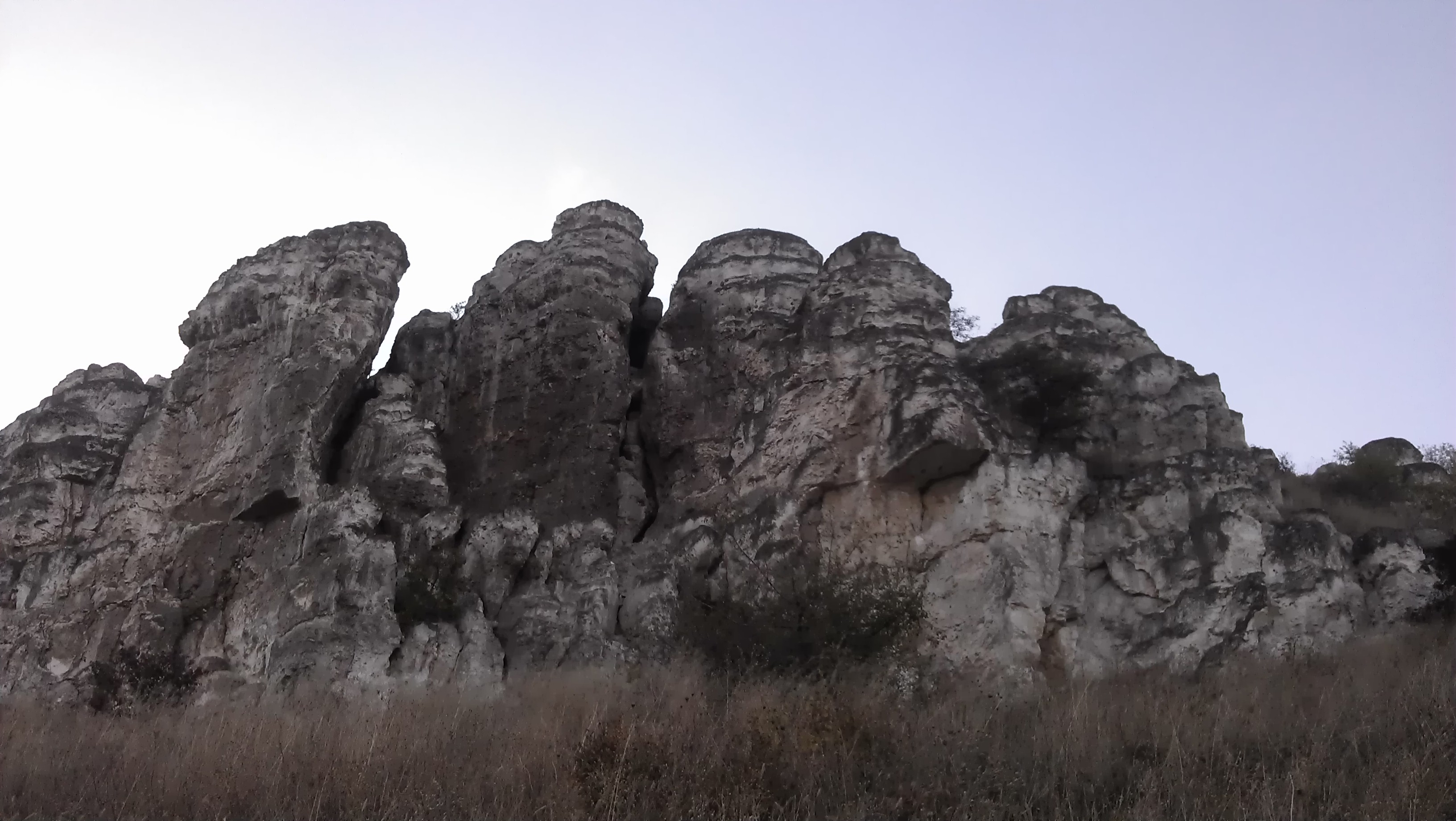 Лысогорка, Куйбышевский район Меловые скалы This image is related to the protected area of Russia number 6110060